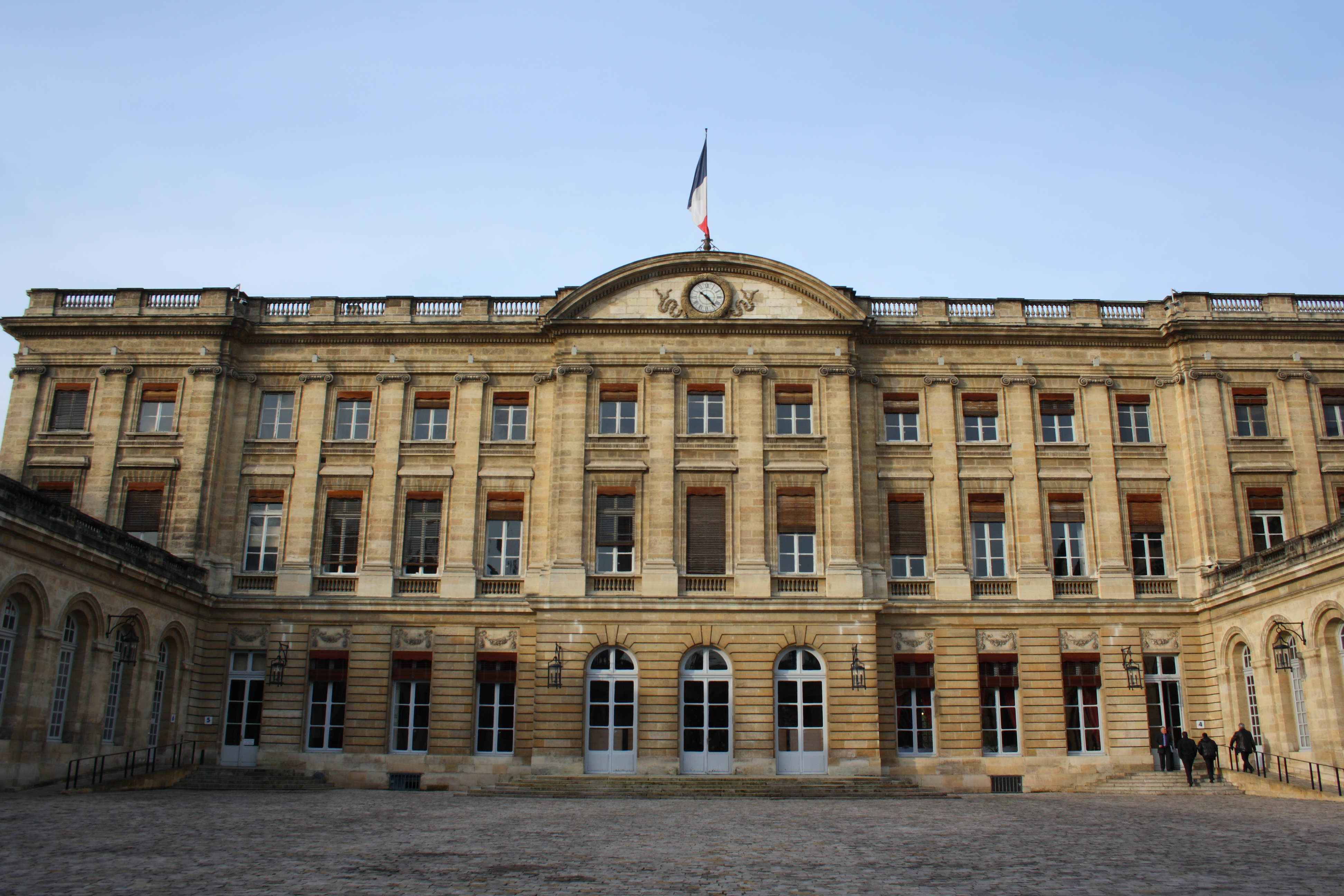 Palais de Rohan in Bordeaux (Region Aquitanien, Frankreich), seit 1835 Hôtel de Ville (Rathaus)